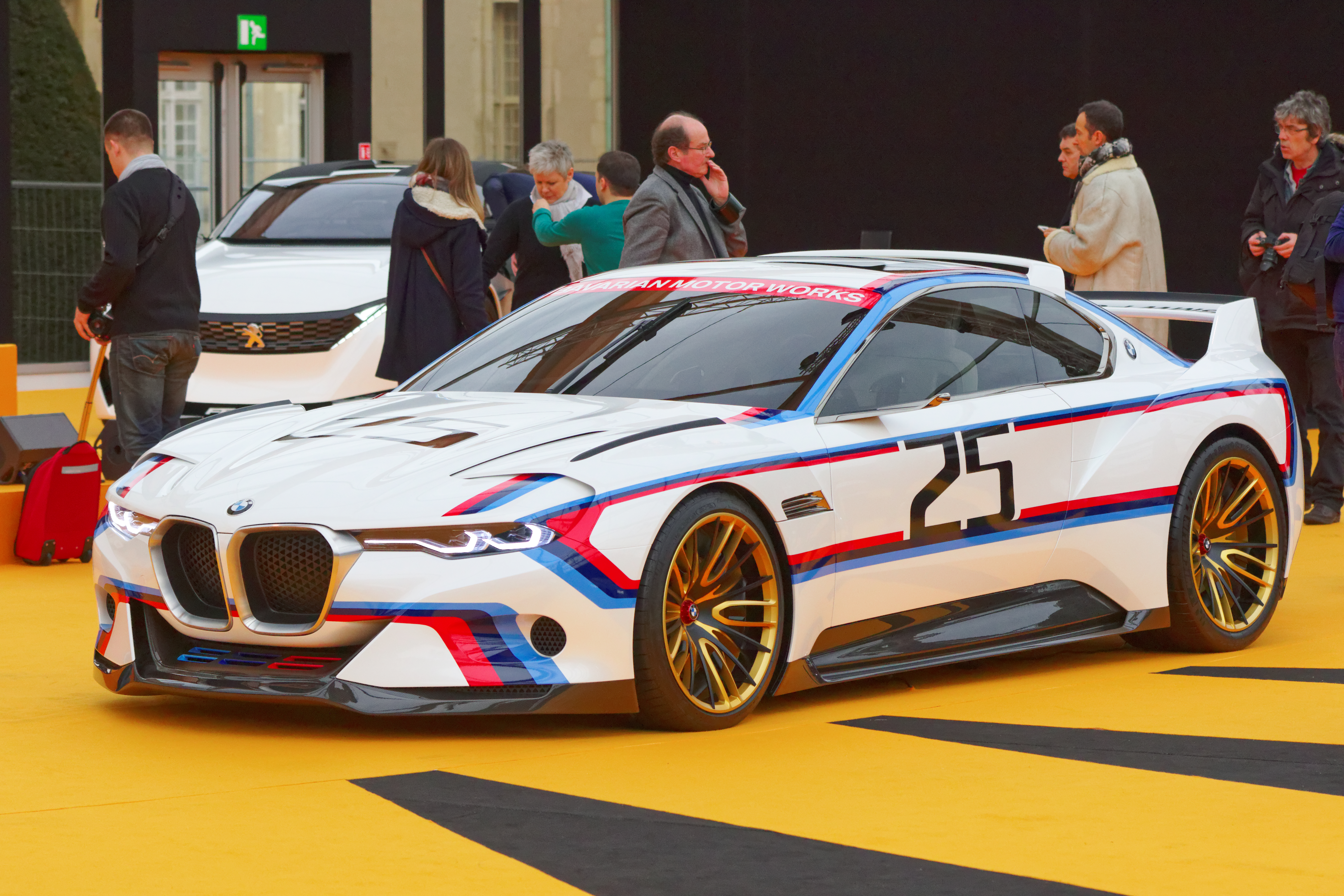 La BMW 3.0 CSL Hommage exposée lors du festival automobile international 2016.